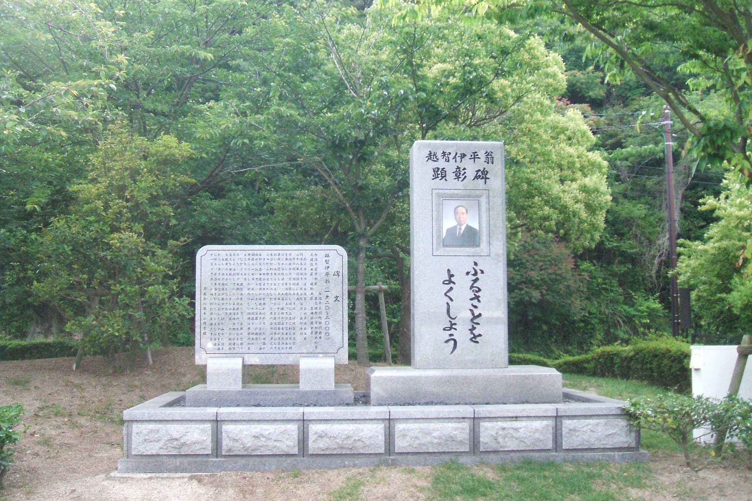 日本の政治家であった越智伊平の顕彰碑。愛媛県今治市にある糸山公園で撮影。